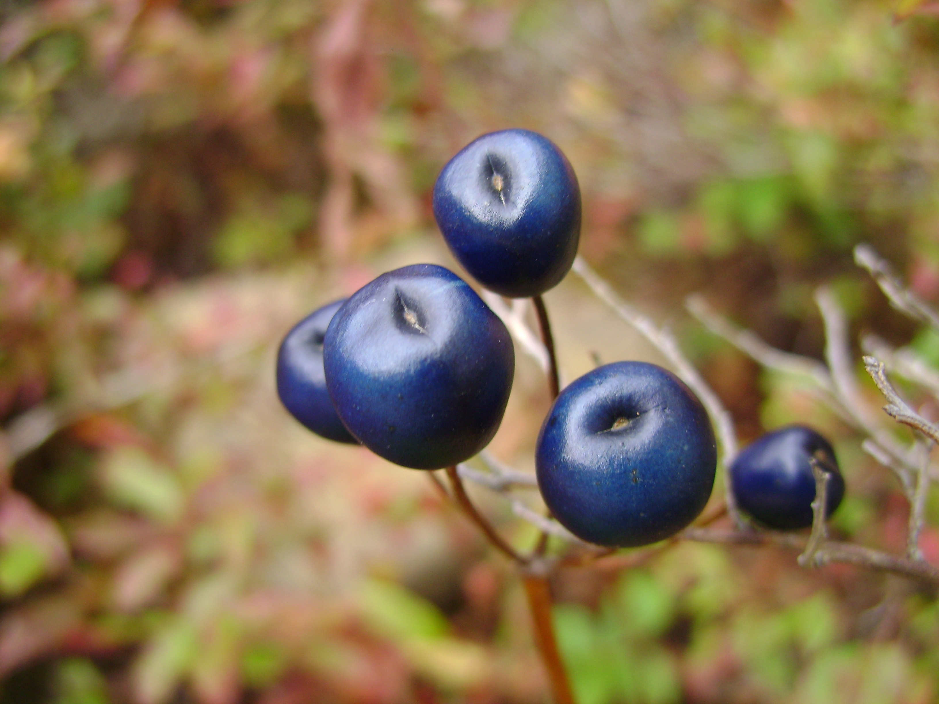 Fruits de clintonie boréale (Clintonia borealis Aiton (Raf.)).